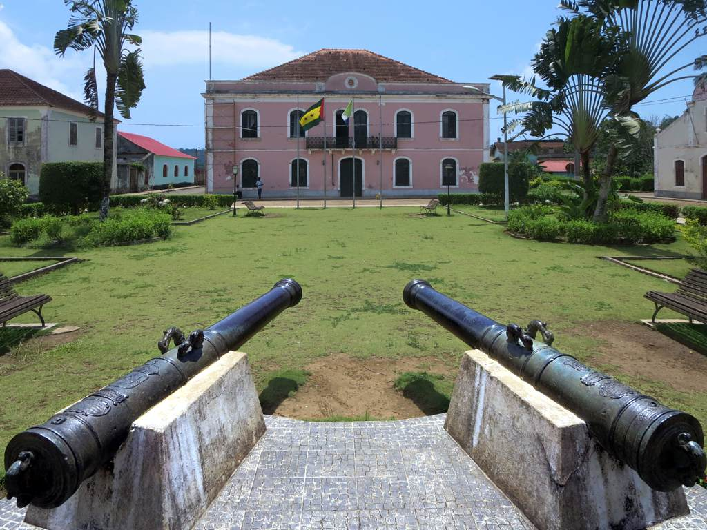 The Palacio do Governo Regional faces Praca Marcelo da Veiga in Santo Antonio on Principe Island, São Tomé and Príncipe.